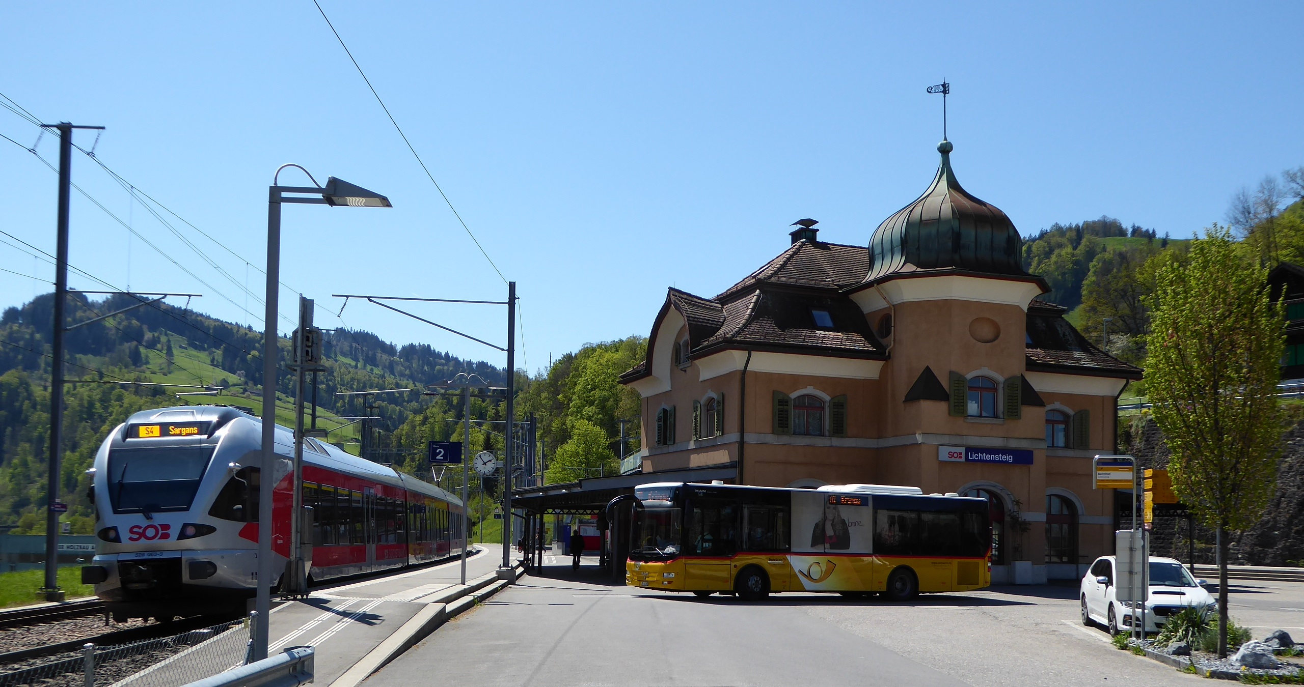 Bahnhof Lichtensteig, links ein RABe 526 der SOB (Flirt), in der Mitte das Postauto nach Krinau